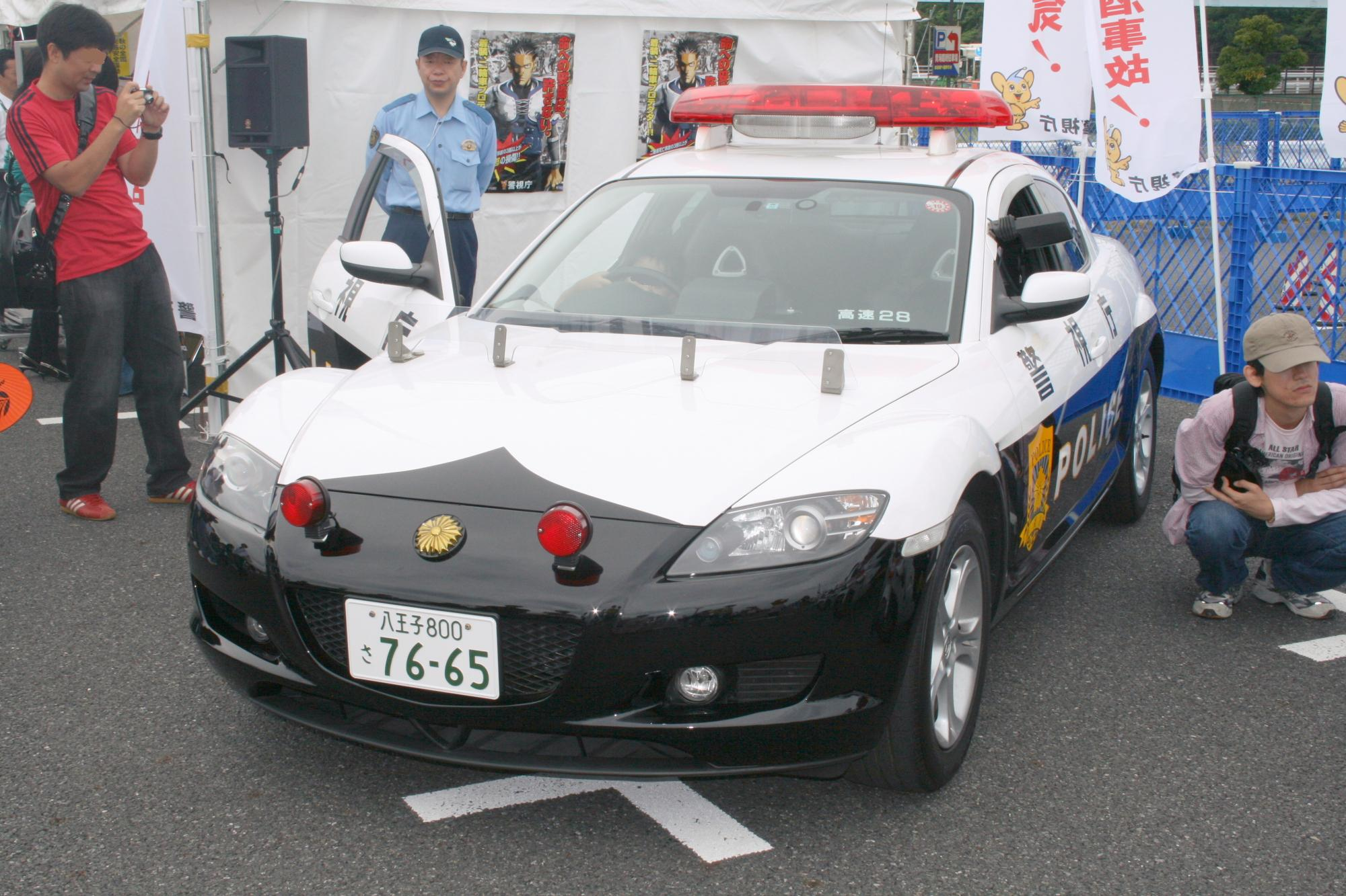 Mazda RX-8 in Odaiba